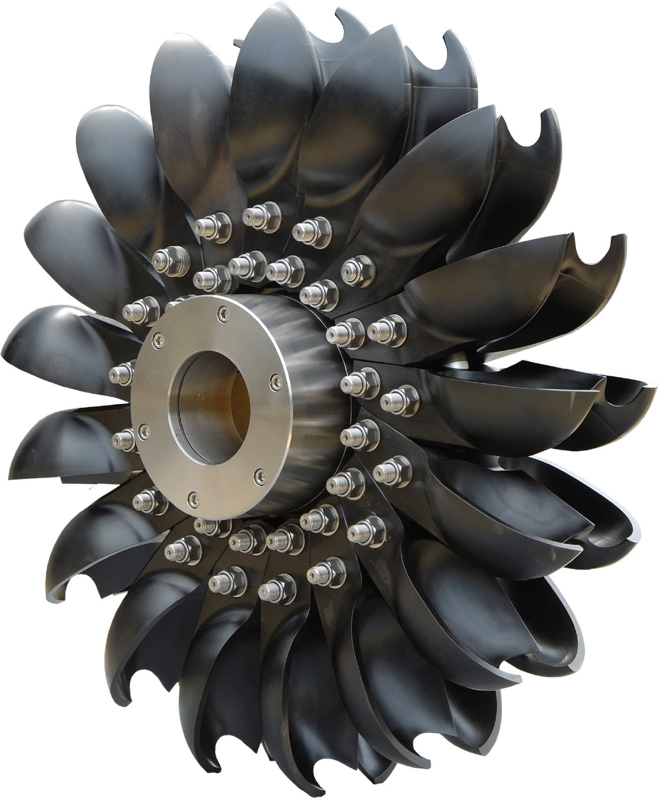 Peltoni turbiin